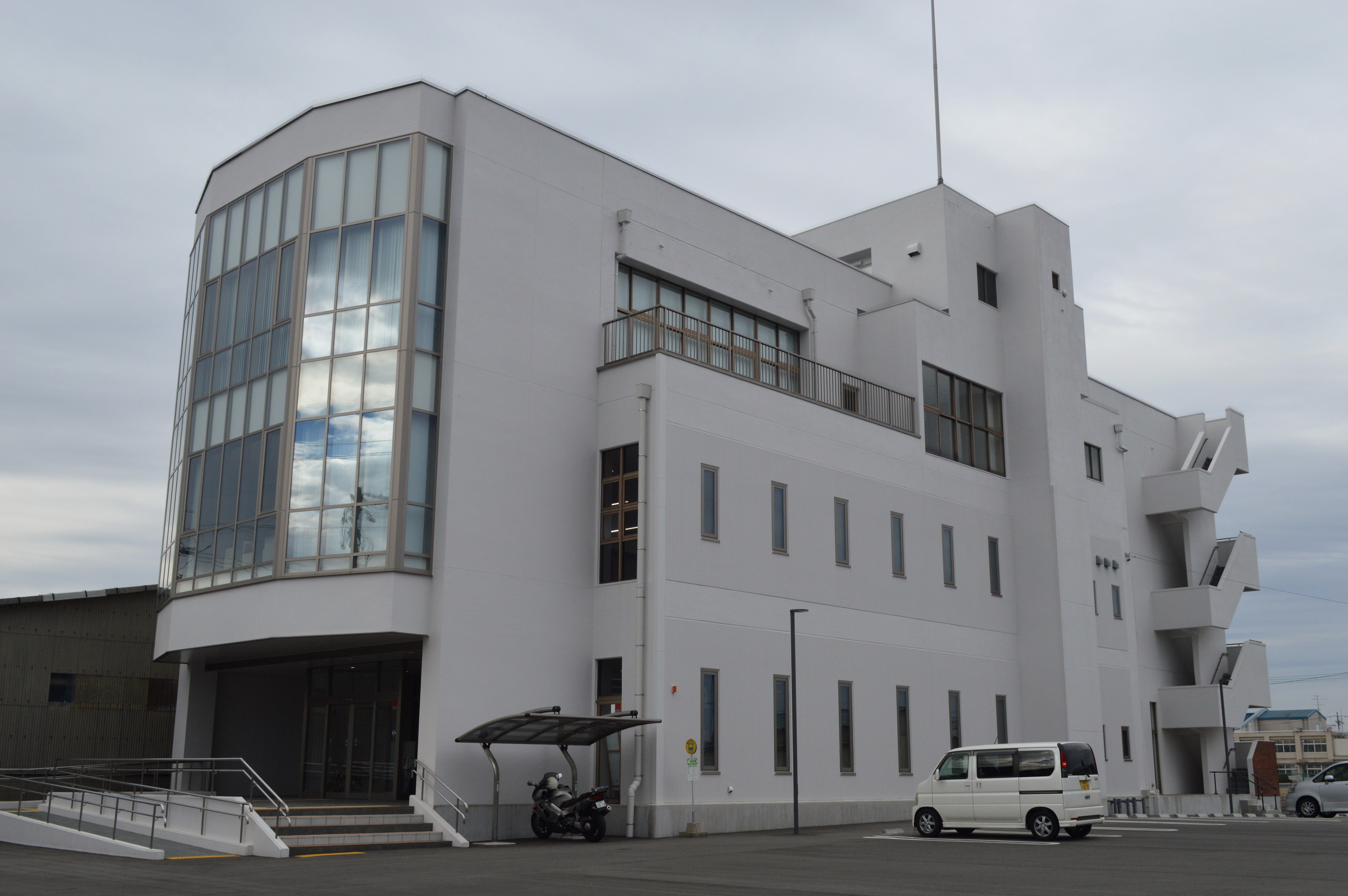 愛知県愛西市にある愛西市役所立田支所。旧・立田村役場。